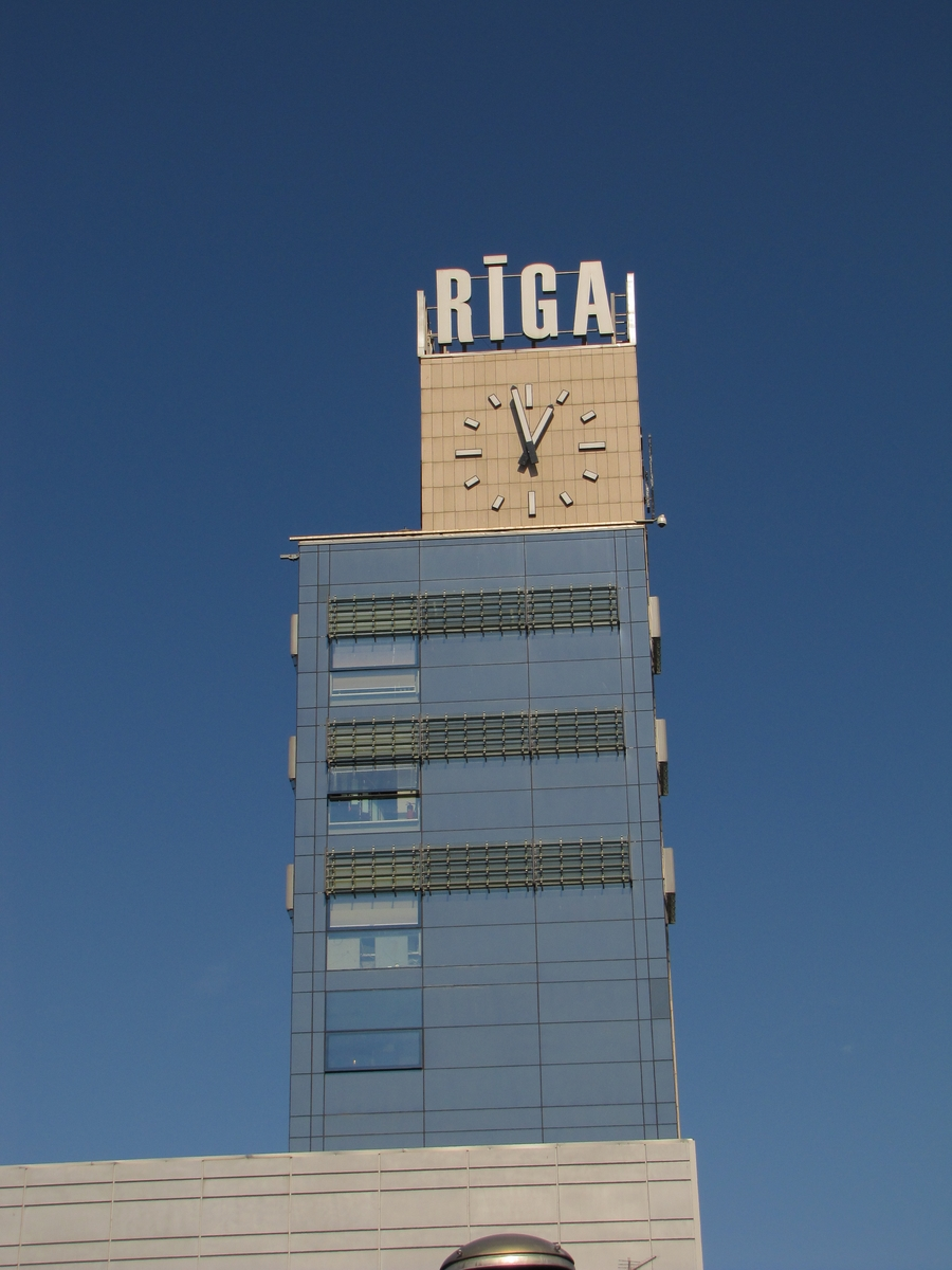 rigas centrala stacija